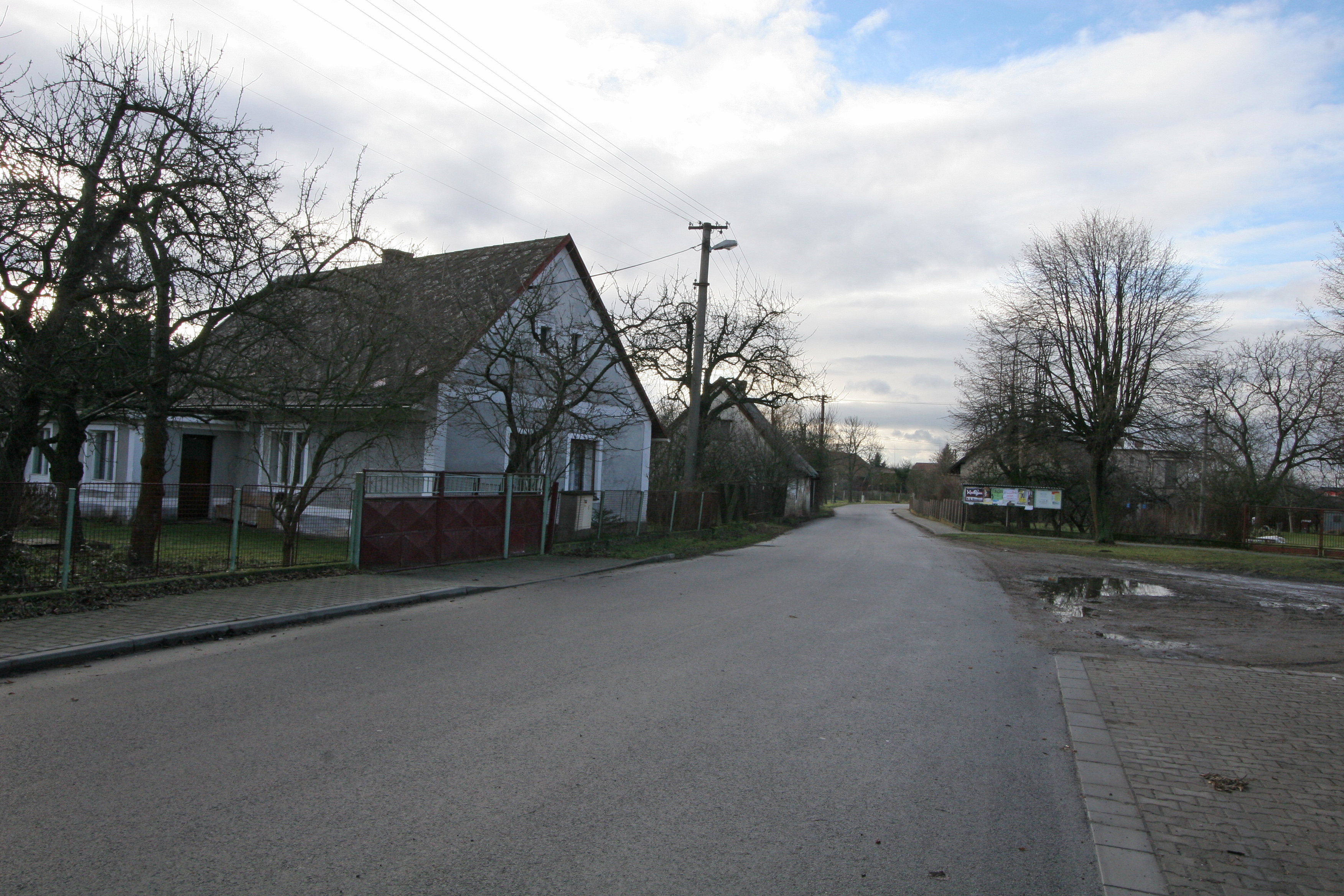 Habřinka čp. 6